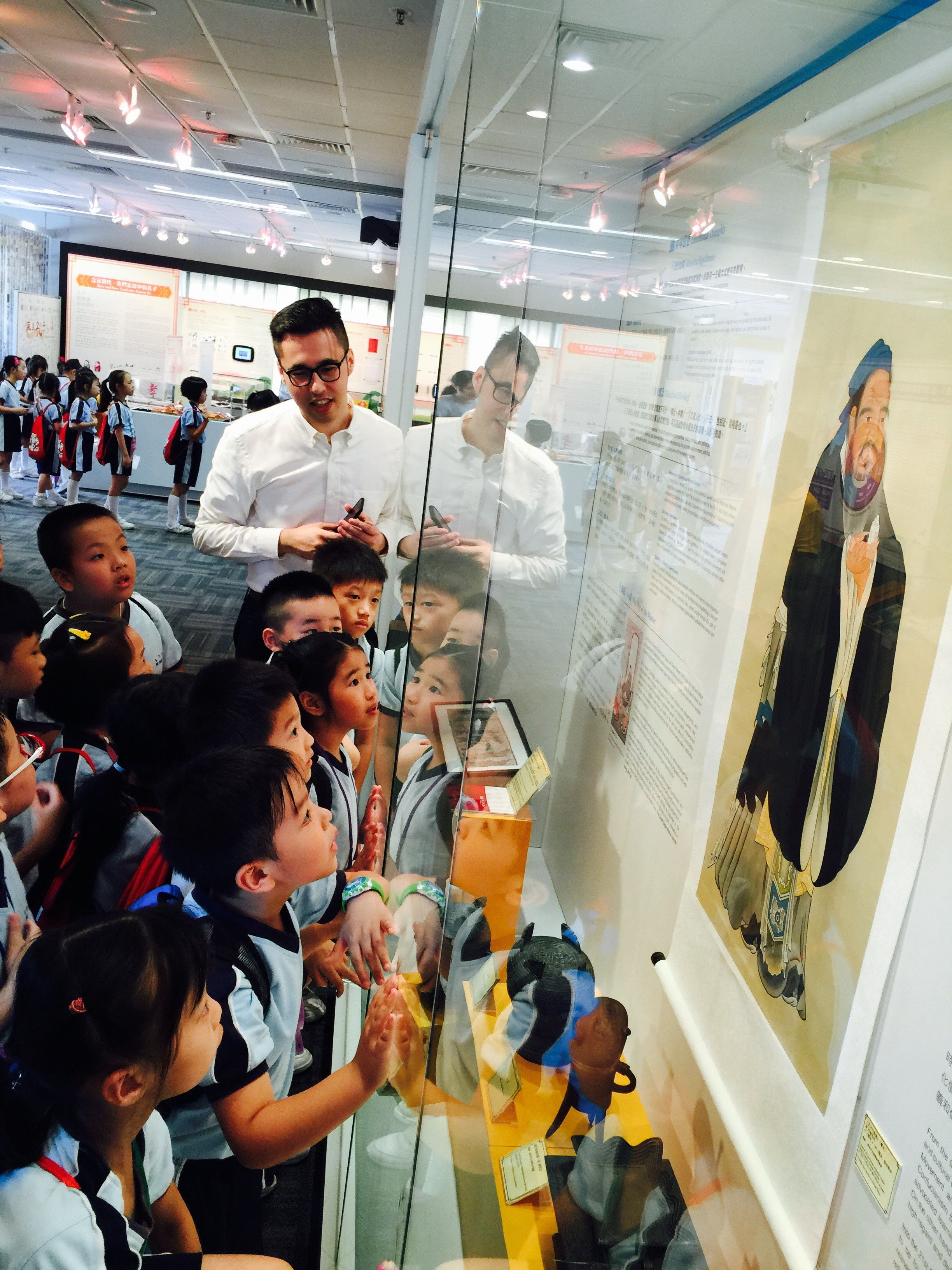 中文（香港）: 「再遇孔子：我和孔老師有個動漫有約會」展覽